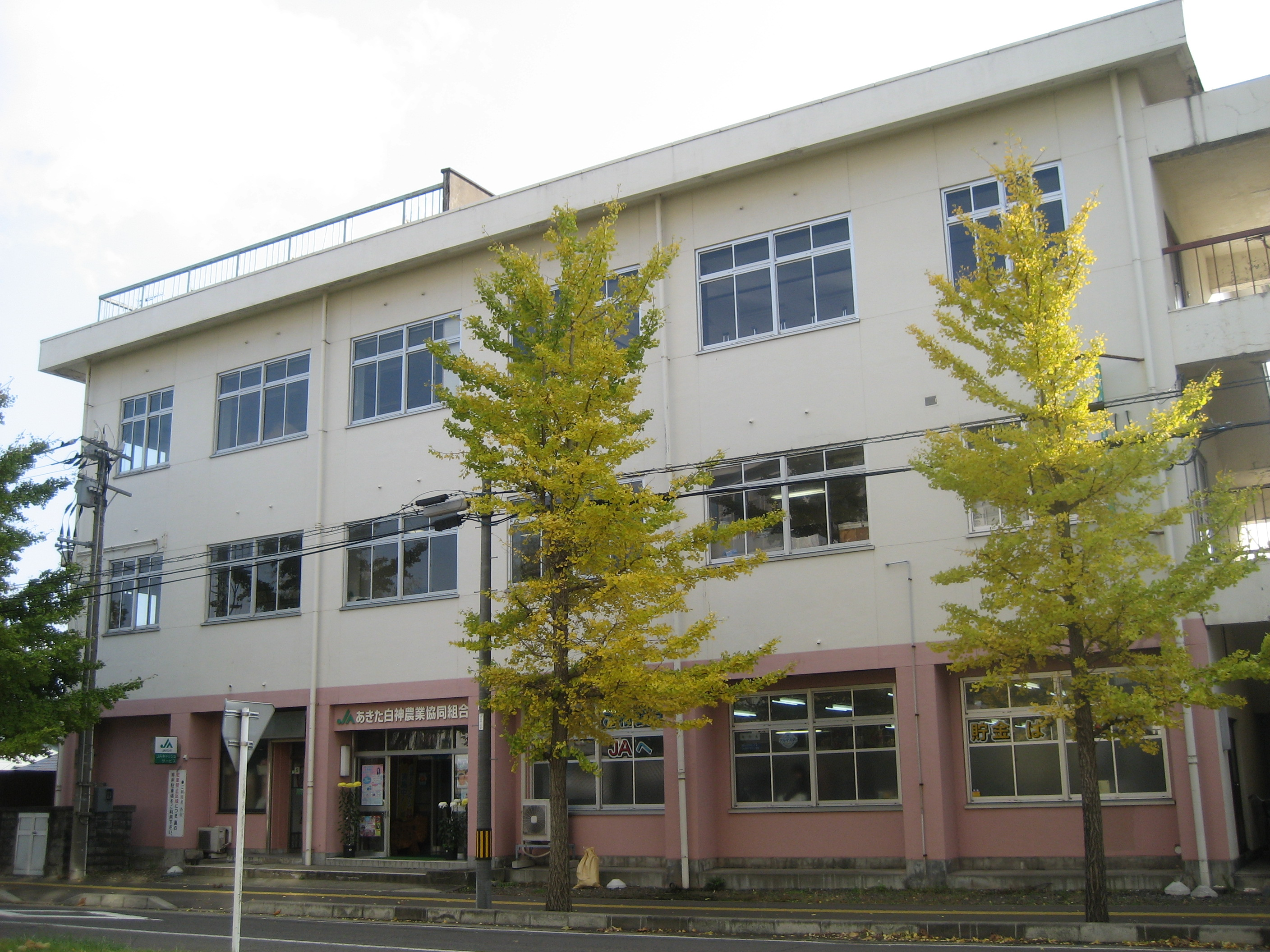 JAあきた白神本店